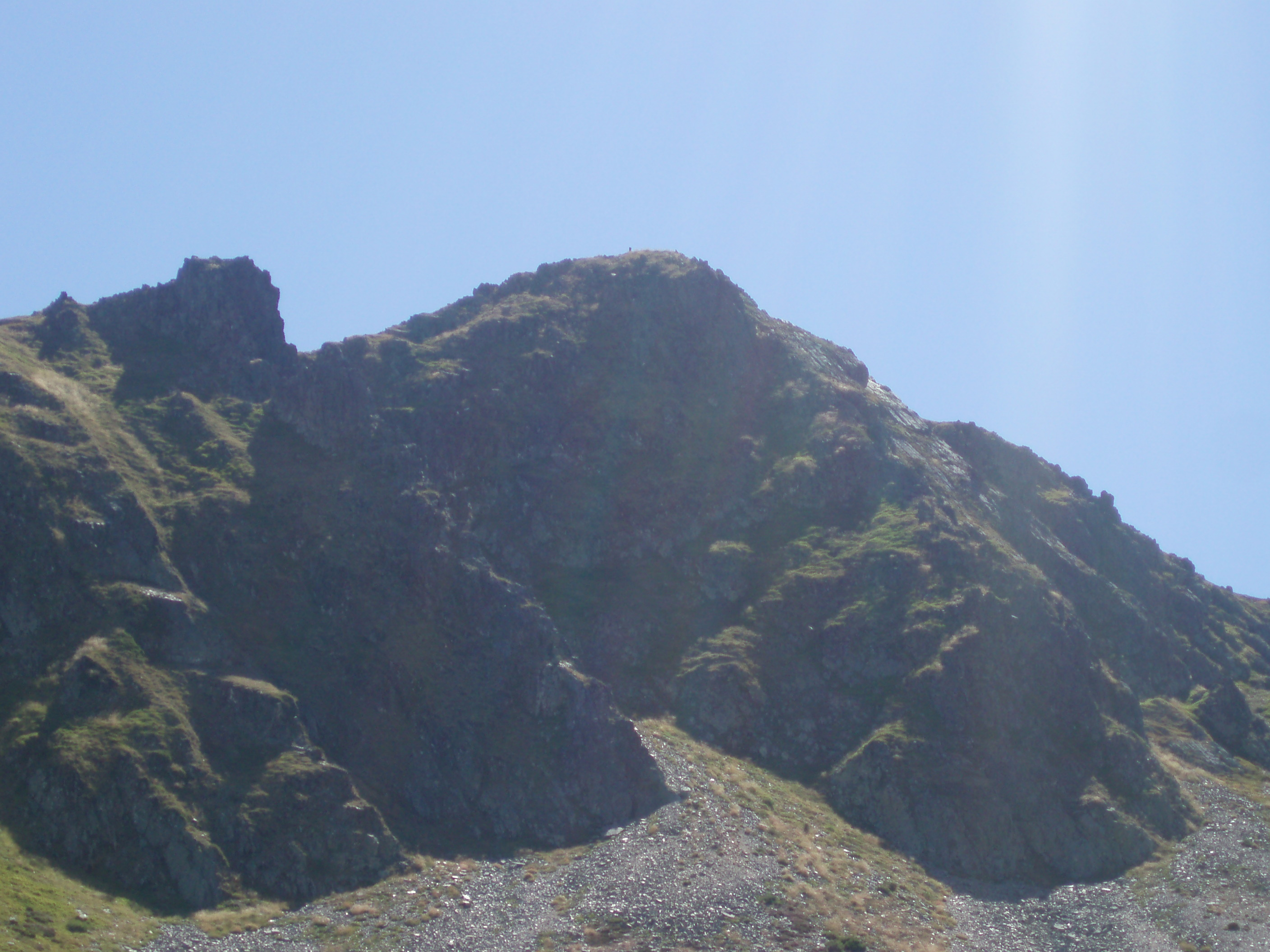 Vista del monte Catoute, el más alto de El Bierzo, provincia de León, España.